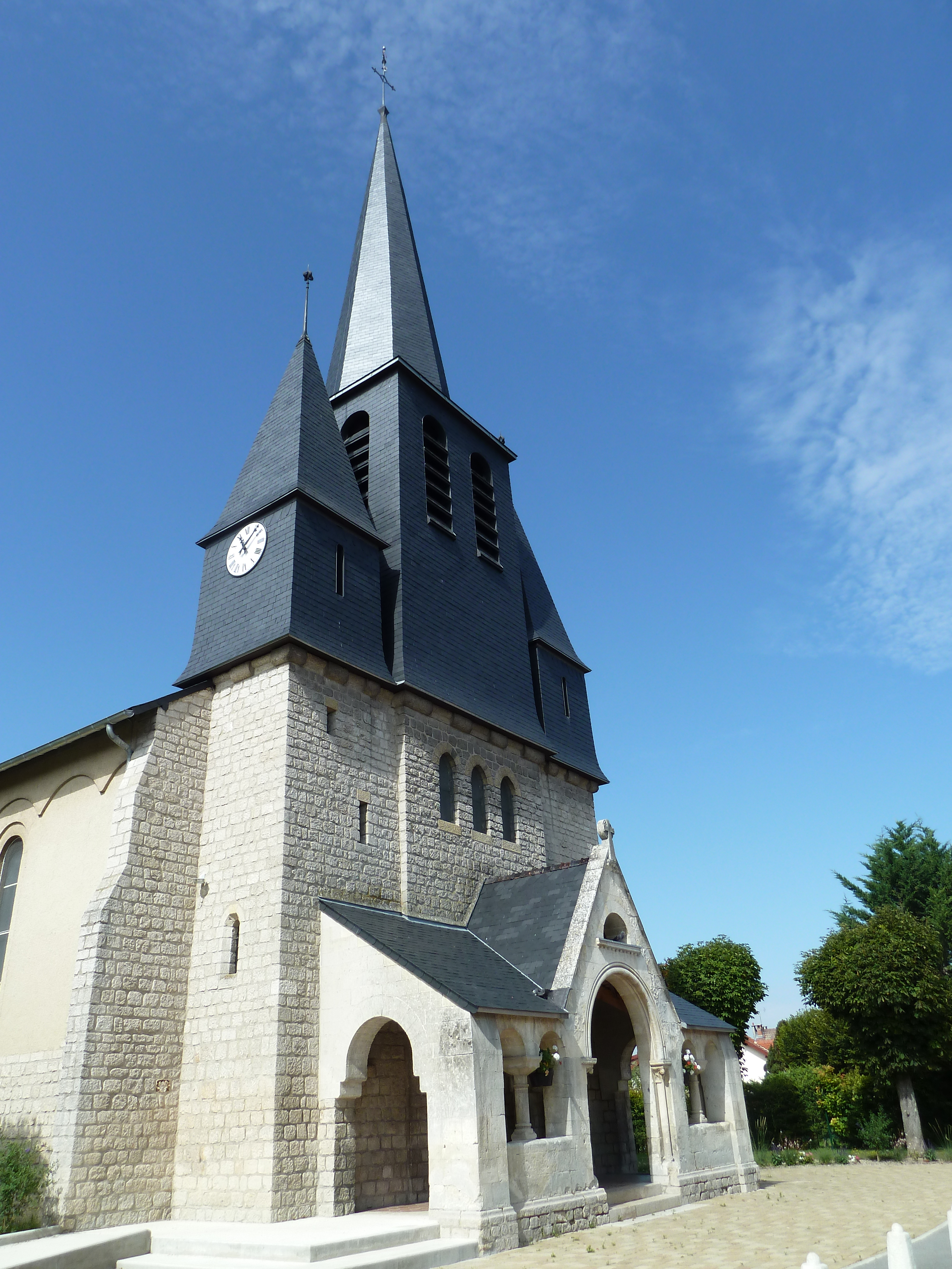 Eglise de Loivre (Marne)